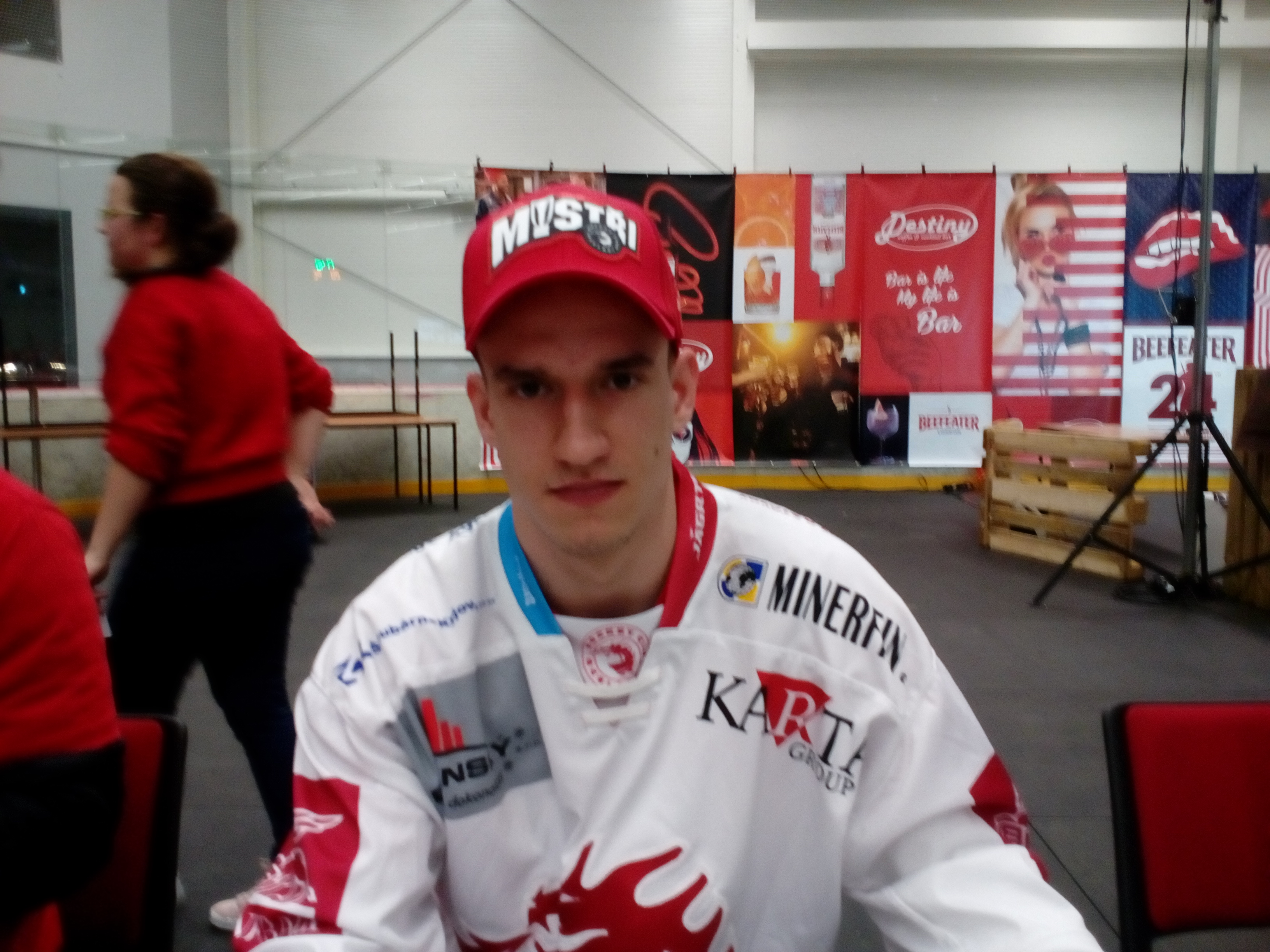 Po zakončení sezóny 2018/19 na autogramiádě v malé (tréningové) Werk Areně